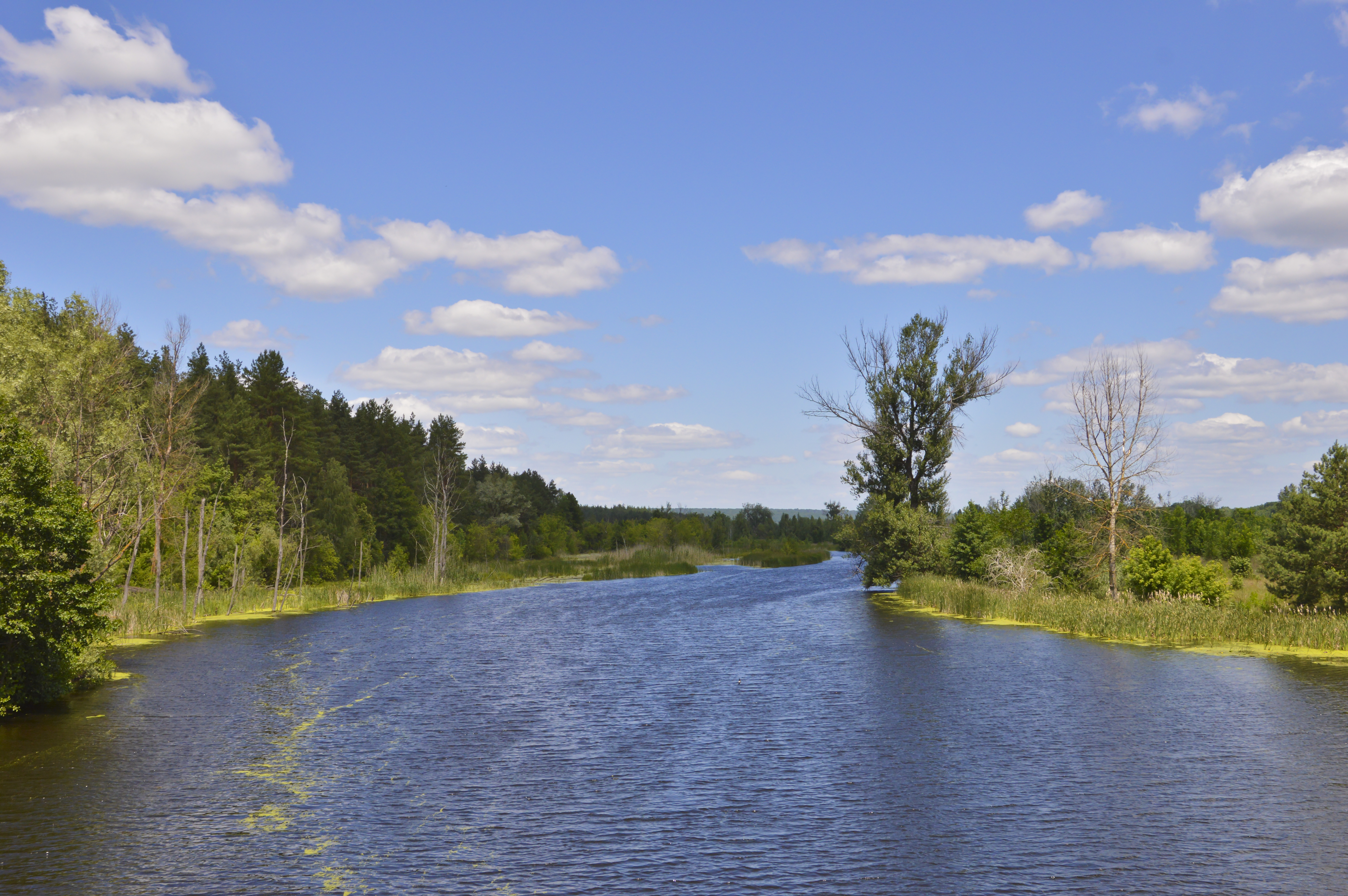 «Гетьманський», В.-Писарівський р-н: Дмитрівська, Попівська, Вільненська, Ямненська, Добрянська, Солдатська, Рябинівська, Катанська, Кирилівська с/р, В.-Писарівська сел./р; ДП «Охтирський лісгосп»: В.Писарівське л-во, кв. 31-45, 52-66. ДП «Тростянецький лісгосп»: Литовське л-во, кв. 25-27. ДП «В.-Писарівський агролісгосп». Охтирський р-н: Бакирівська, Староіванівська, Пологівська, Кардашівська, Чернеччинська, Хухрянська, Лутищанська, В'язівська, Куземинська с/р; ДП «Охтирський лісгосп»: Охтирське л-во, кв. 1-42, 76-77; Хухрянське л-во, кв. 22, 27-28, 38-40, 51-60, 78, 84-85, 88-92, 97-98. ДП «Тростянецький лісгосп»: Литовське л-во, кв. 69. ДП «Охтирський агролісгосп»: кв. 28 (вид. 1-8, 13-21), 50 (вид. 1-6), 30 (вид. 1-12, 14-19), 31 (вид. 1, 5-9, 23), 92 (вид. 1-9, 18-19), 95 (вид. 1-13, 15, 17-20), 77 (вид. 14, 18-31), 78 (вид. 6-11, 13), 79 (вид. 1-17). Тростянецький р-н: Кам'янська, Зарічненська, Мащанська с/р, Тростянецька м/р; ДП «Тростянецький лісгосп»: Тростянецьке л-во, кв. 1-6, 13, 19-25; 27, 30, 33, 35-45, 78-79. ДП «Тростянецький агролісгосп»: кв. 95 (вид. 29-32, 36, 48, 50, 56), 104 (вид. 1-15), 105 (вид. 4)